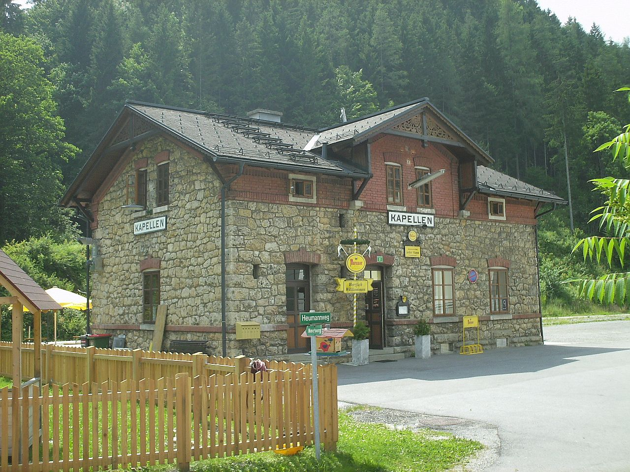 Ehemaliges Bahnhofsgebäude in Kapellen/Österreich. Object location47° 38′ 44.16″ N, 15° 37′ 50.97″ E